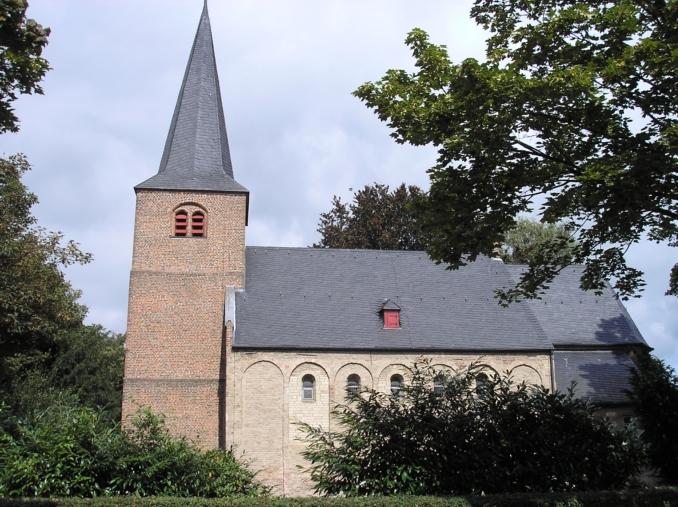 Kirche St. Willibrord im Klever Ortsteil Kellen